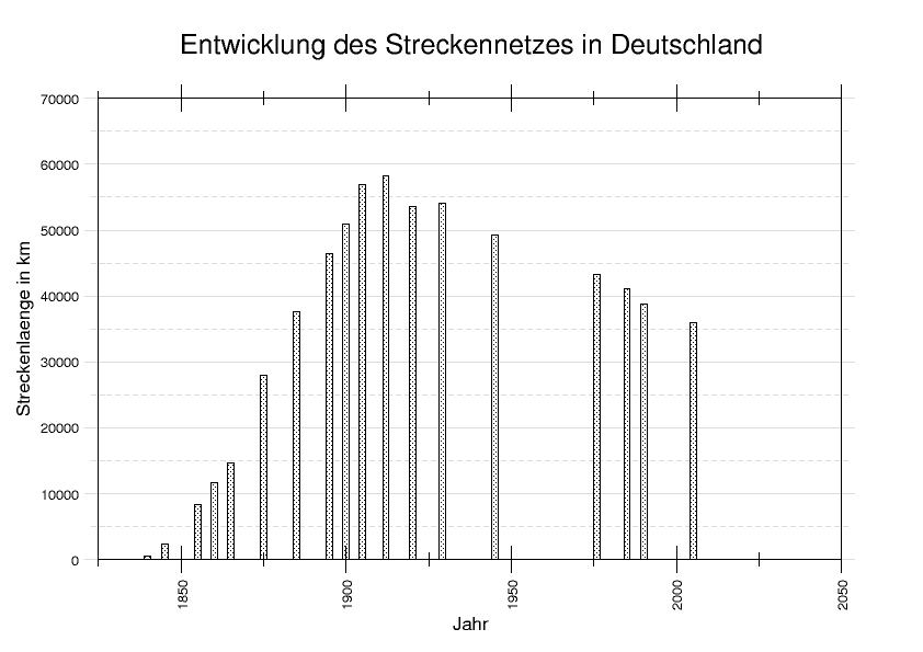 Entwicklung des Streckennetzes der Eisenbahn in Deutschland